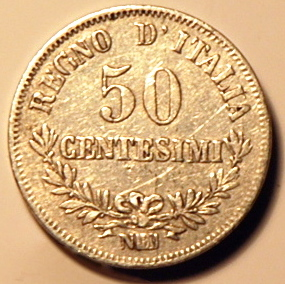 Rovescio di una moneta da 50 centesimi di lira italiana del 1865 coniata a Napoli